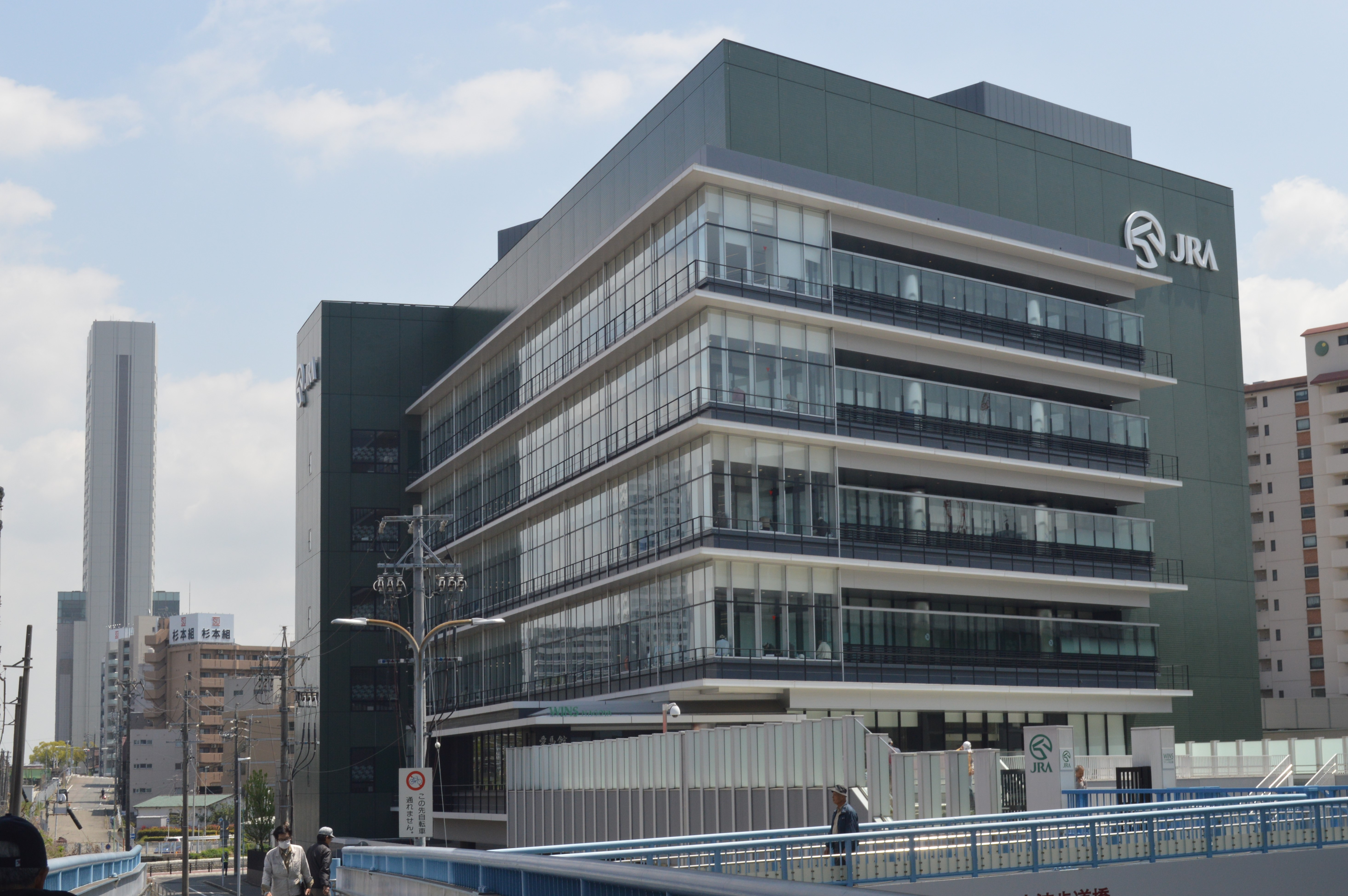 愛知県中川区尾頭橋にあるウインズ名古屋（場外勝馬投票券発売所）。